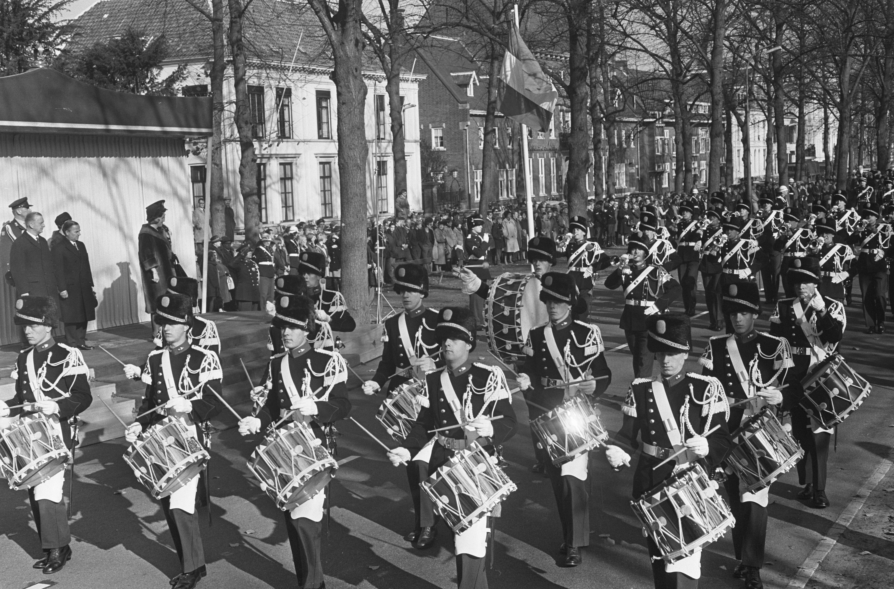 Collectie / Archief : Fotocollectie Anefo Reportage / Serie : [ onbekend ] Beschrijving : 150 jaar Koninklijke Marechaussee , defile op de Maliebaan te Utrecht, overzicht defile Datum : 27 oktober 1964 Locatie : Utrecht Trefwoorden : Defiles, overzichten Instellingsnaam : Koninklijke Marechaussee Fotograaf : Pot, Harry / Anefo Auteursrechthebbende : Nationaal Archief Materiaalsoort : Negatief (zwart/wit) Nummer archiefinventaris : bekijk toegang 2.24.01.05 Bestanddeelnummer : 917-0641 Reacties Geplaatst door Maaike op 19 februari 2013 - 15:18. Trefwoorden: tamboerkorps; trompetterkorps; blaaskapel